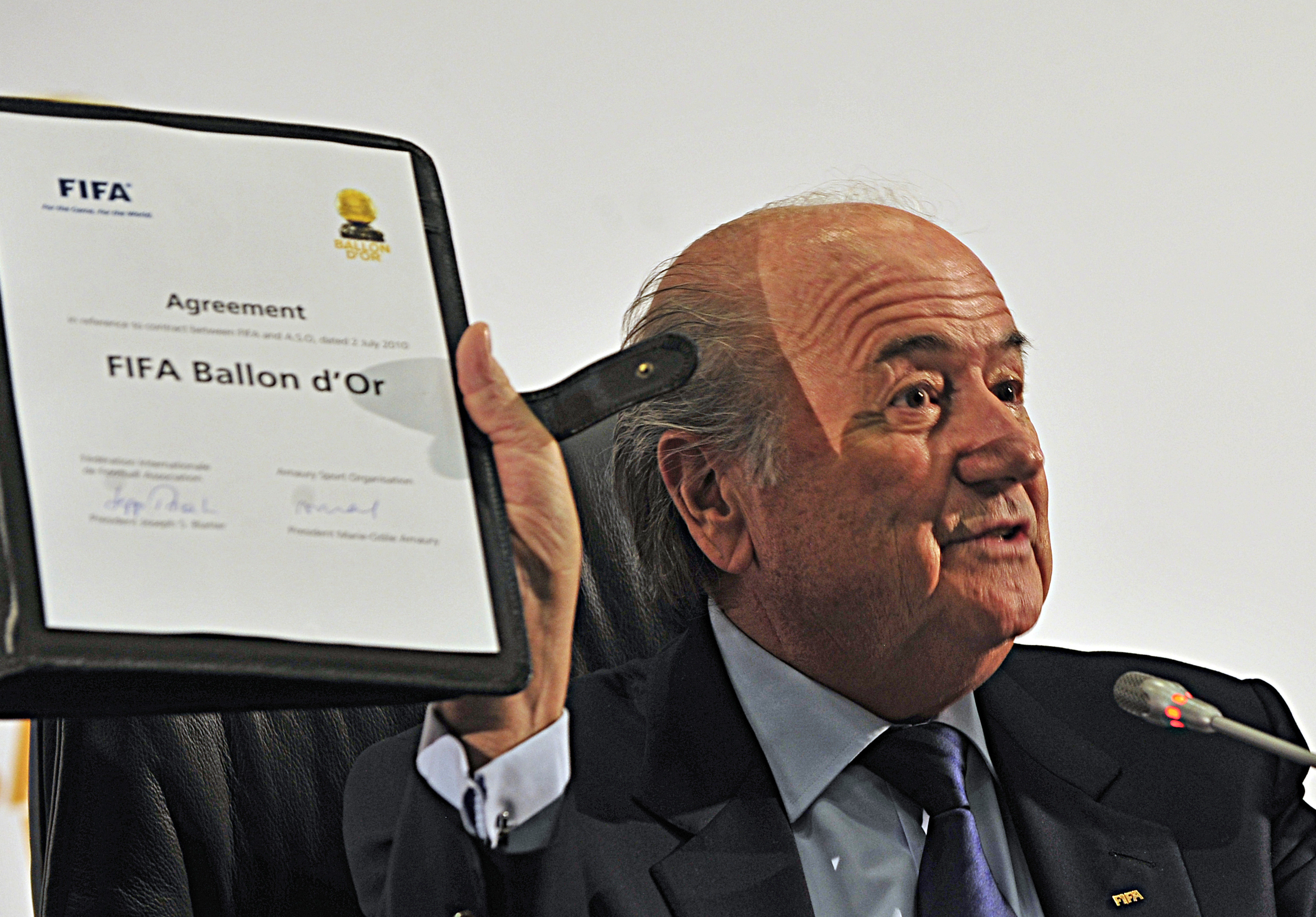 Joanesburgo (África do Sul) - O presidente da Fifa, Joseph Blatter, durante entrevista coletiva em evento que Fifa e a revista France Football asssinaram um acordo para unificar os dois principais prêmios concedidos aos melhores jogadores do mundo